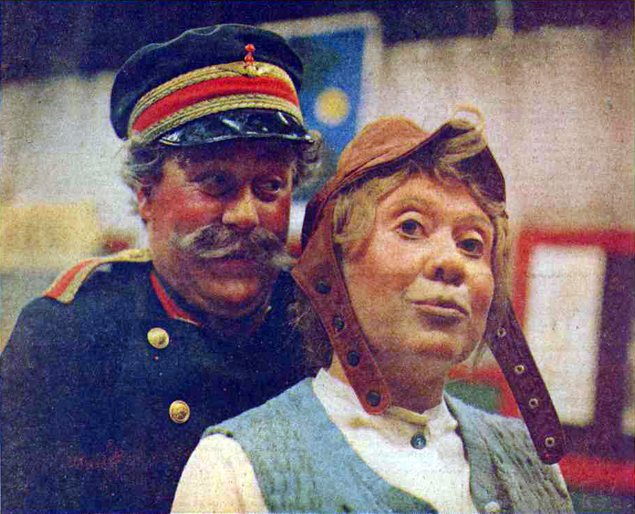 Hans Lindgren och Inga Gill i TV:s julkalender 1968 (Klart spår till Tomteboda). Fotot publicerades i Dagens Nyheter 1968-11-30 (s. 20).